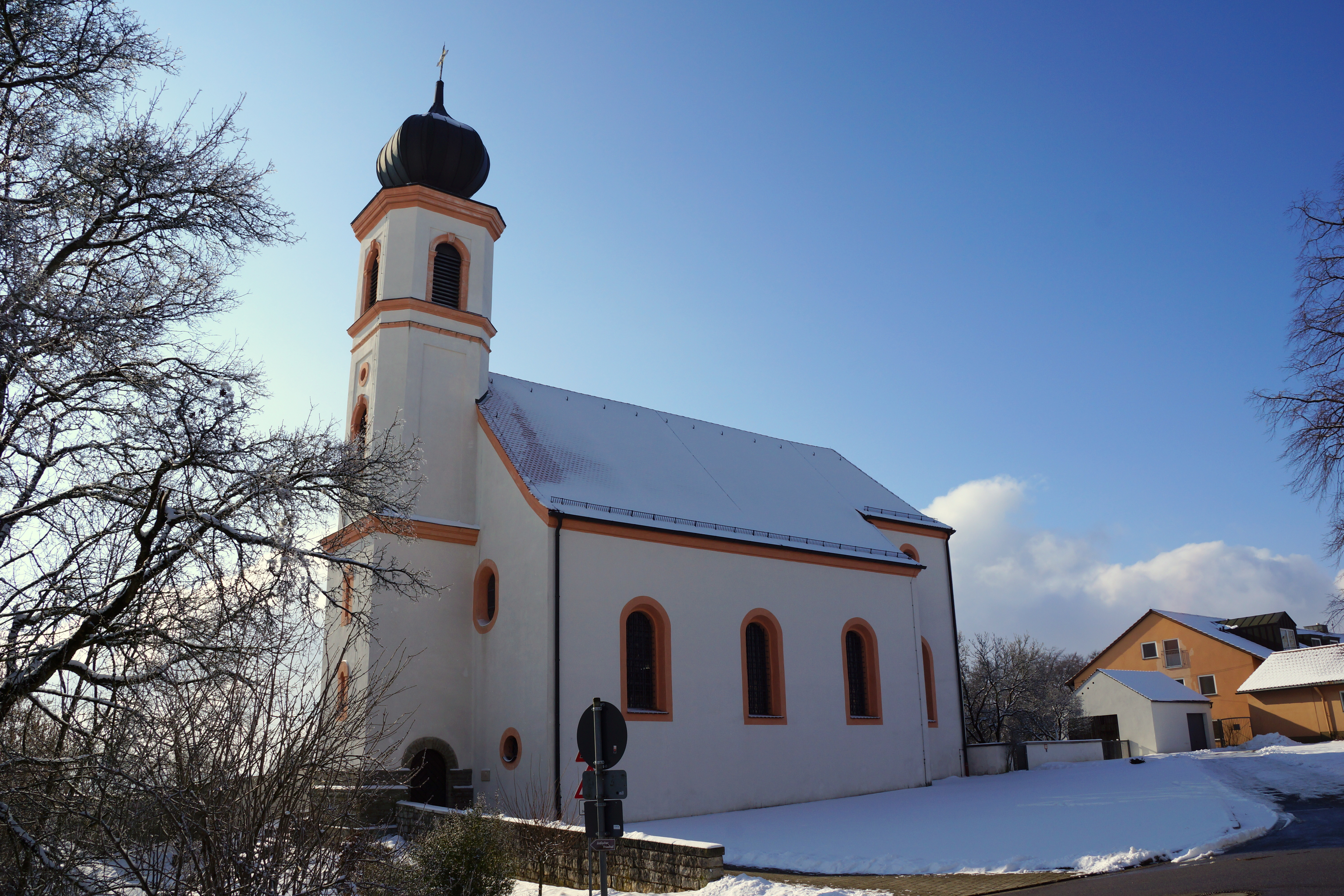 Die katholische Pfarrkirche Maria sieben Schmerzen / Mater Dolorosa in/ auf dem Sulzbürg, Kreis Neumarkt Oberpfalz